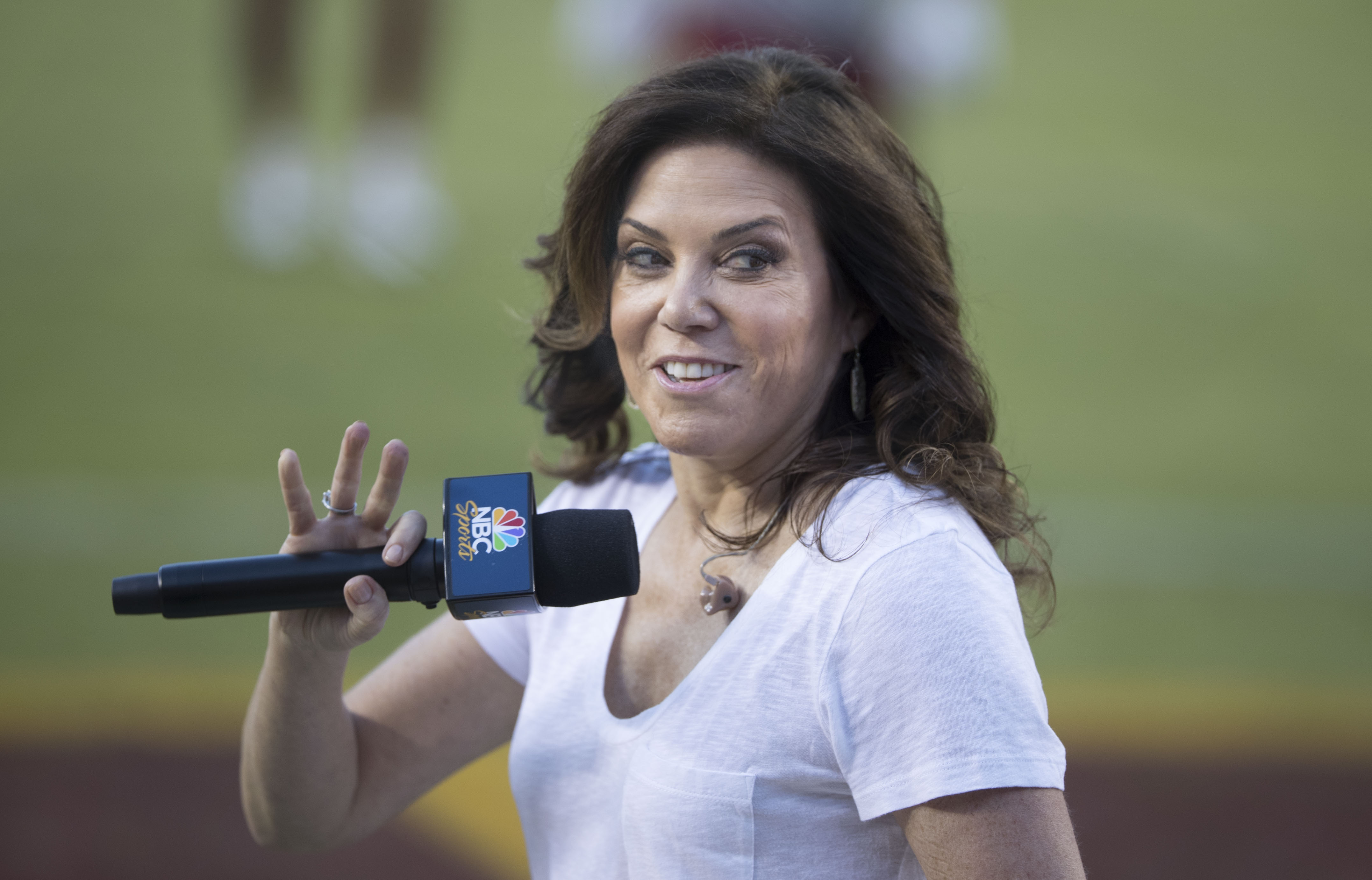 Raiders at Redskins 9/24/17